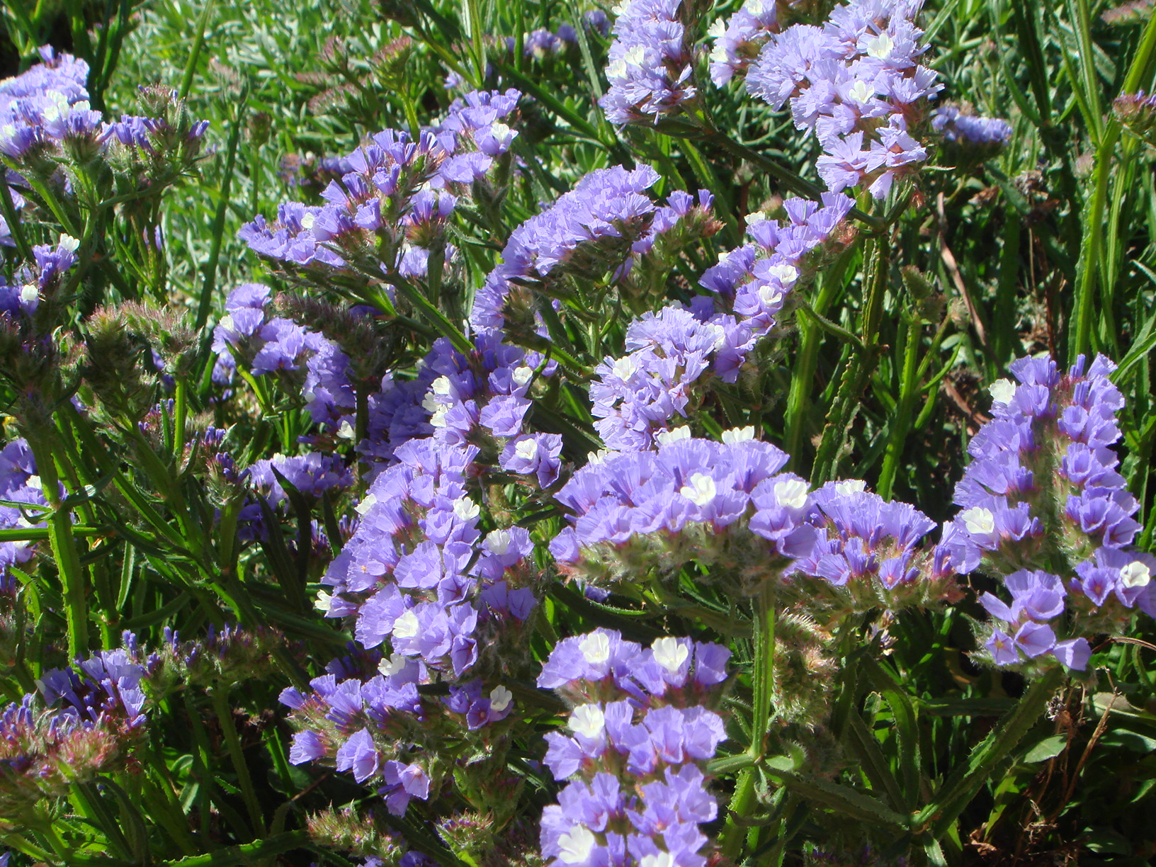 Limonium sinuatum Jardín Botánico de San Fernando, Cádiz, España